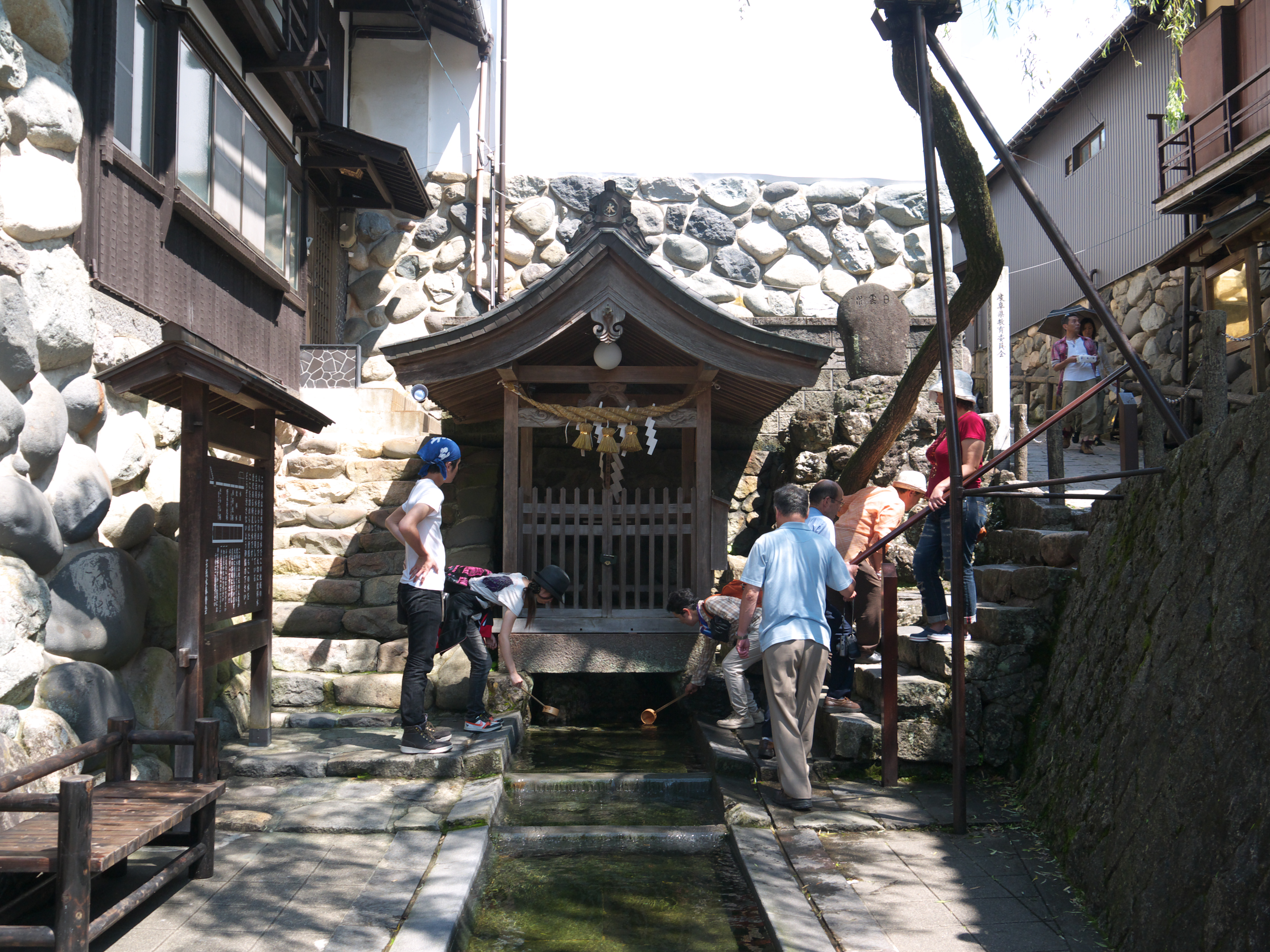 名水百選郡上市宗祇水